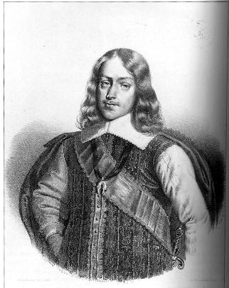 Ferdinand IV.